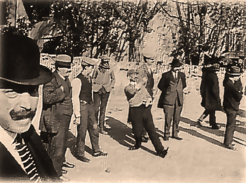 Jeu provençal préparation des trois saut avant de tirer